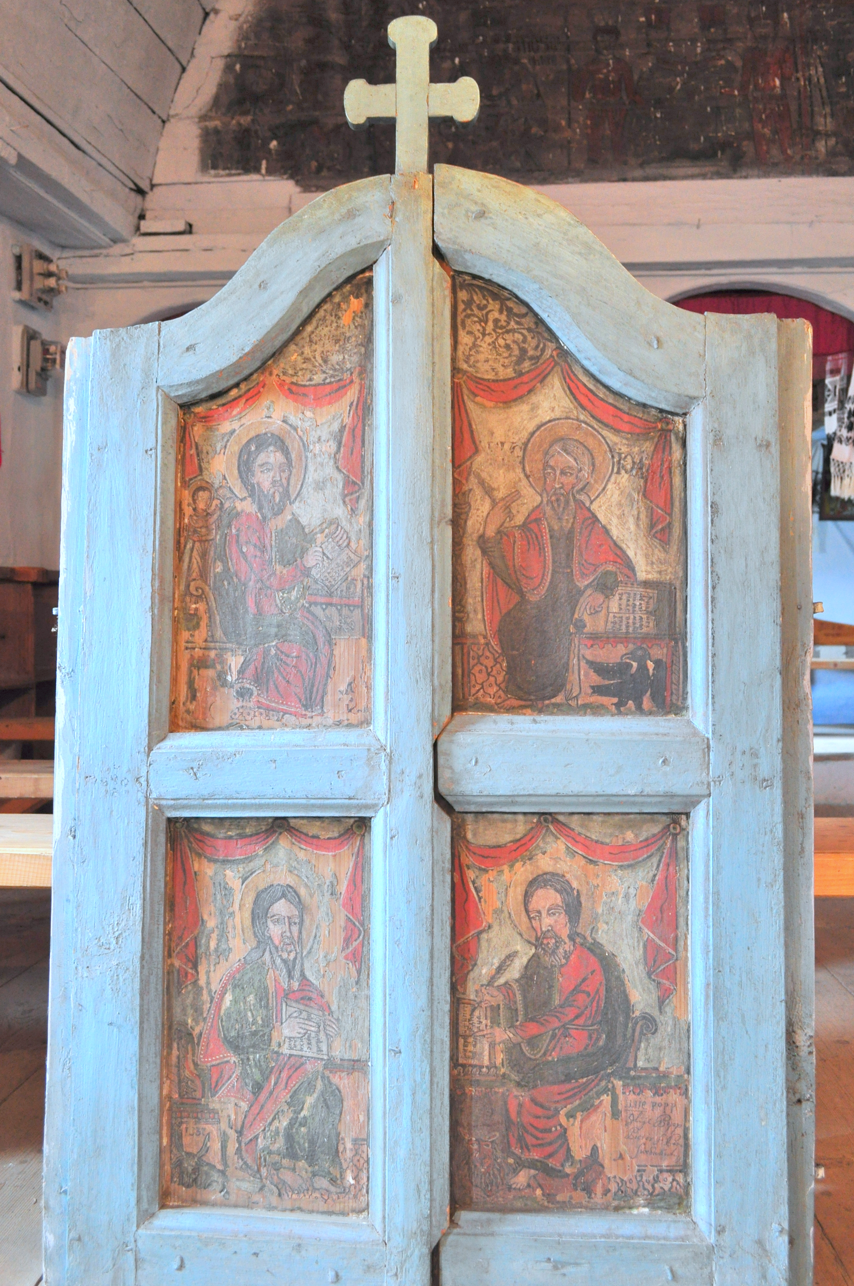 Biserica de lemn „Sfinții Arhangheli” din Surduc, județul Cluj